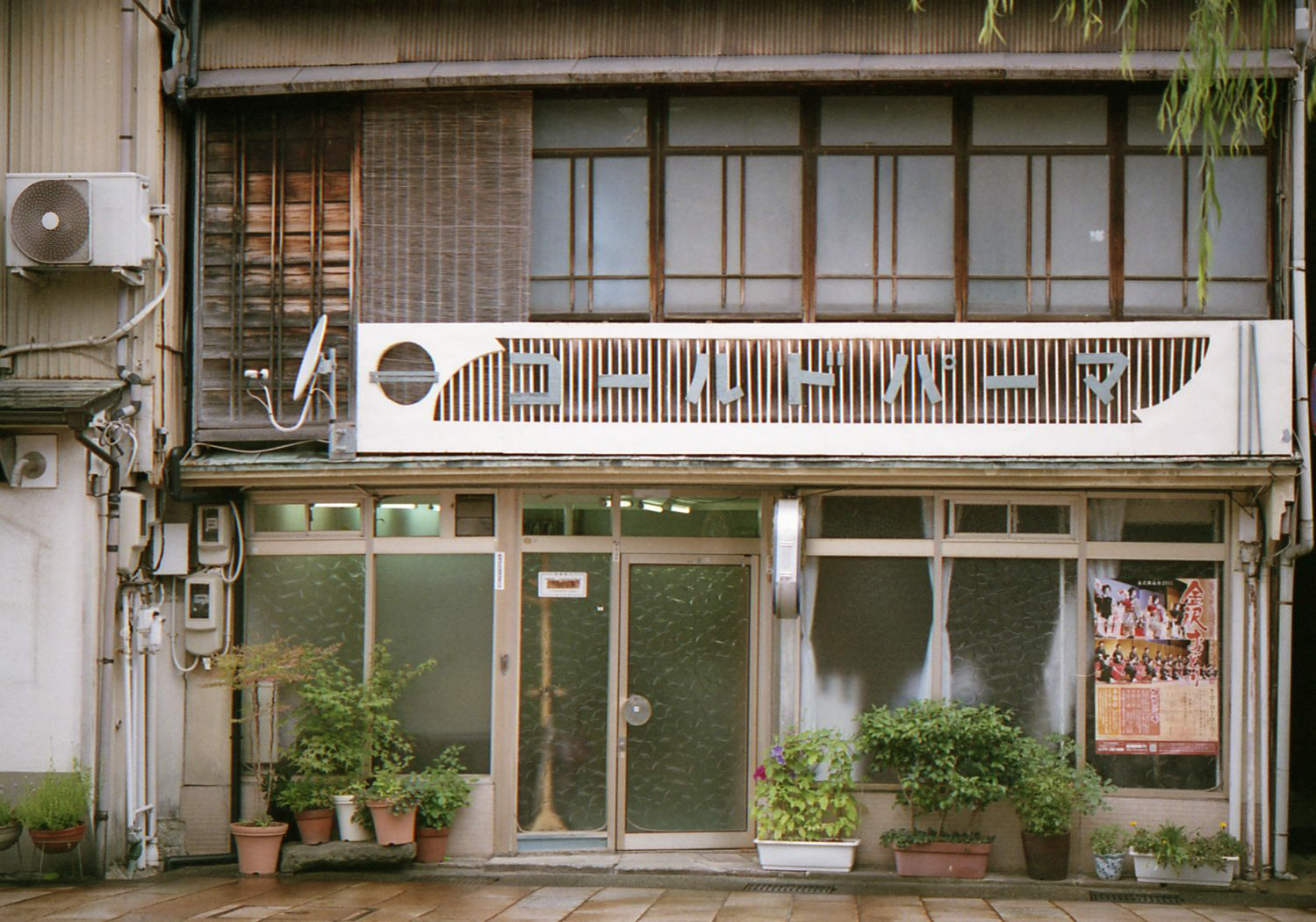 Kanazawa_Higashi_Cyayagai1